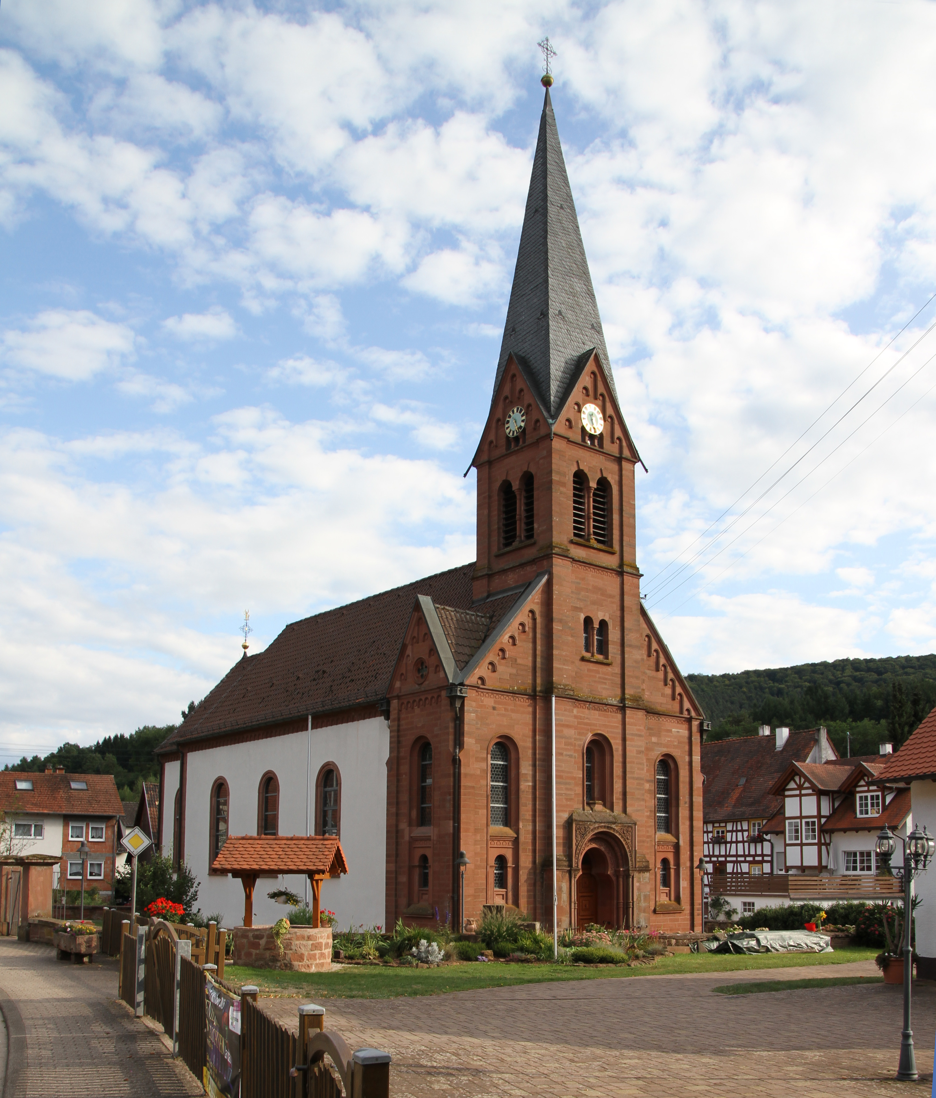 Bobenthal, Katholische Kirche St. Michael, Hauptstraße 18; kleiner Saalbau, 1779, Westfassade mit Turm von 1879, Architekt Franz Schöberl.